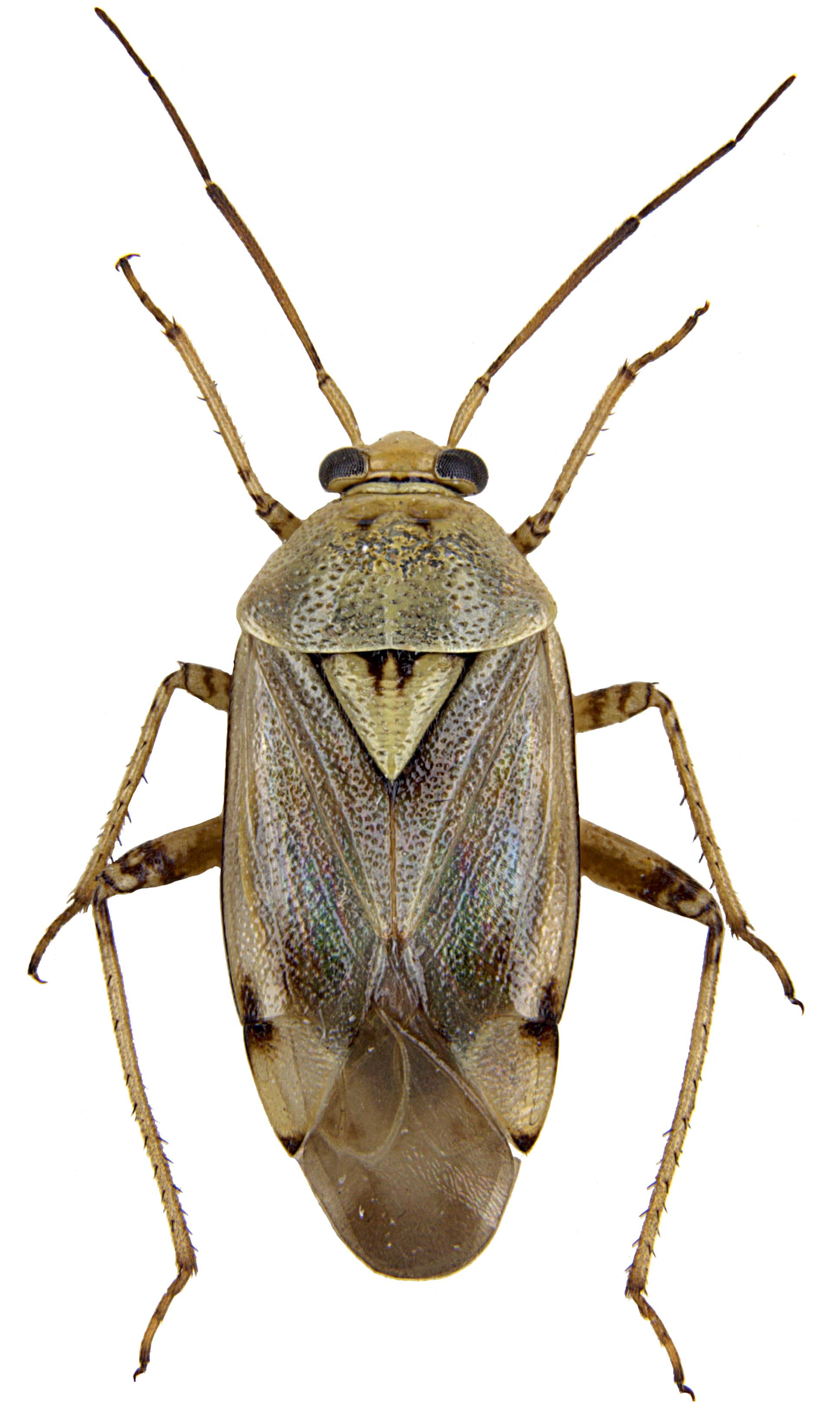 Habitus, specimen in Zoologische Staatssammlung München, Foto: Marianne Müller